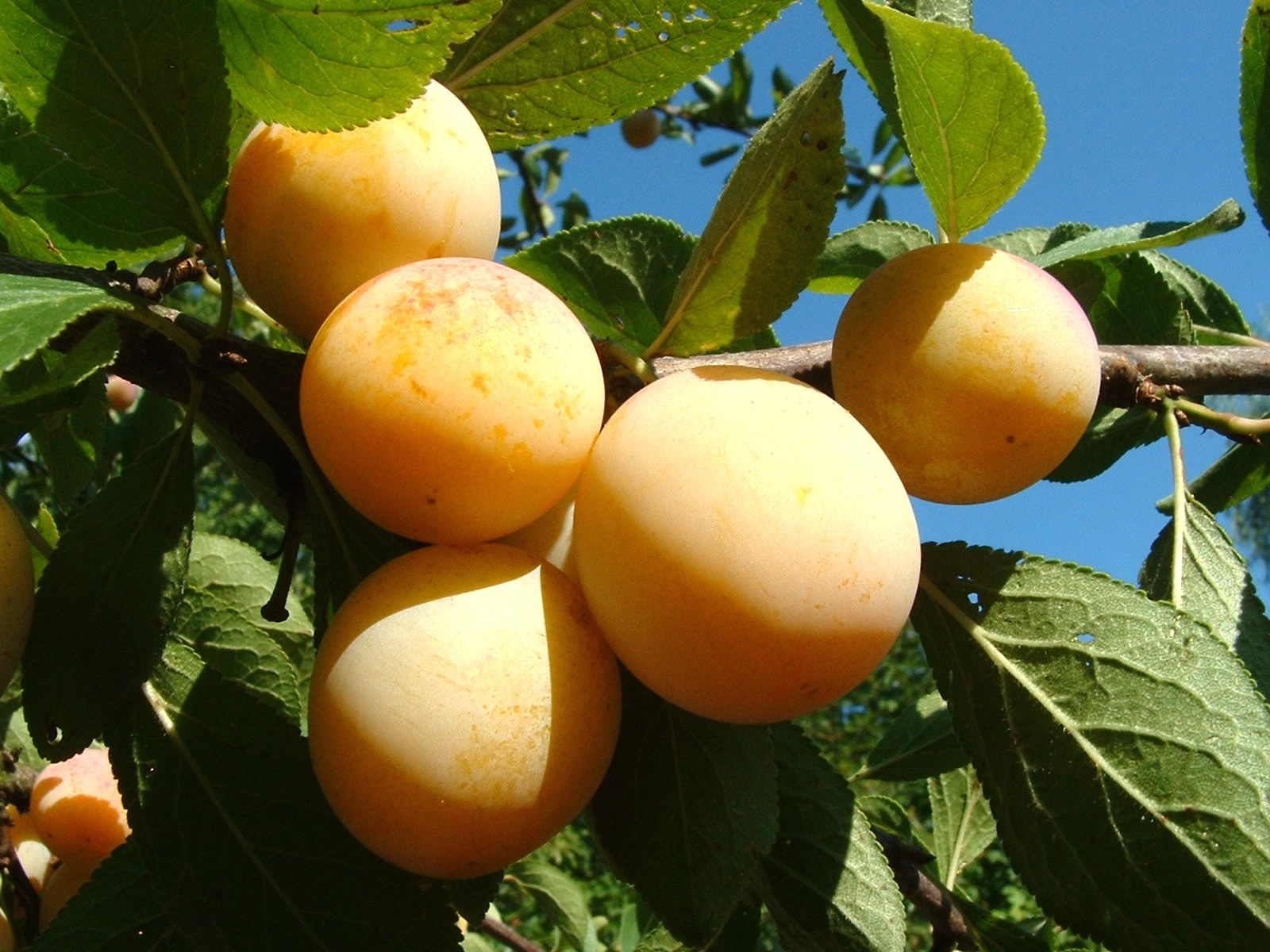 Mirabelles de Lorraine sur l'arbre. Été 2002 / Mirabelles of Lorraine on tree. Summer 2002